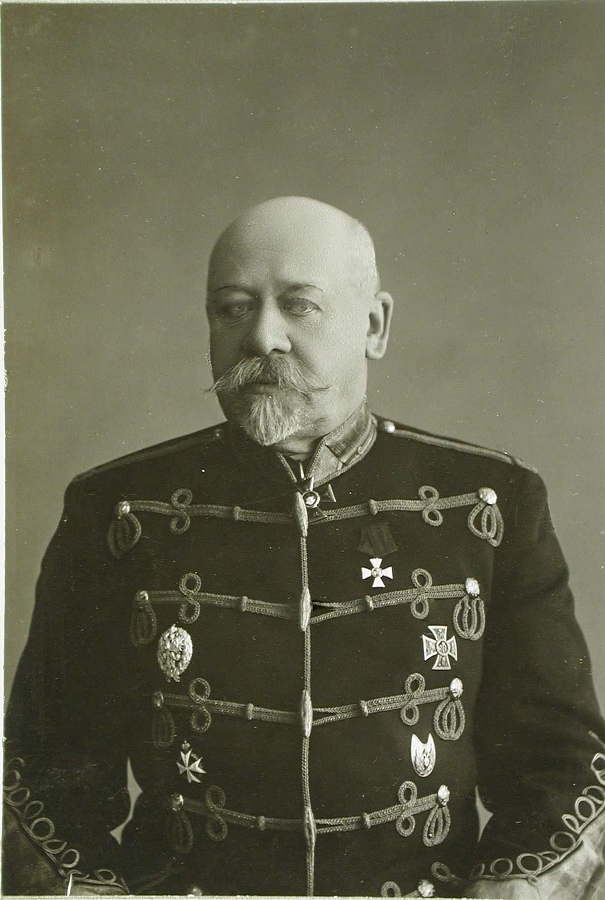 Сухомлинов Владимир Александрович